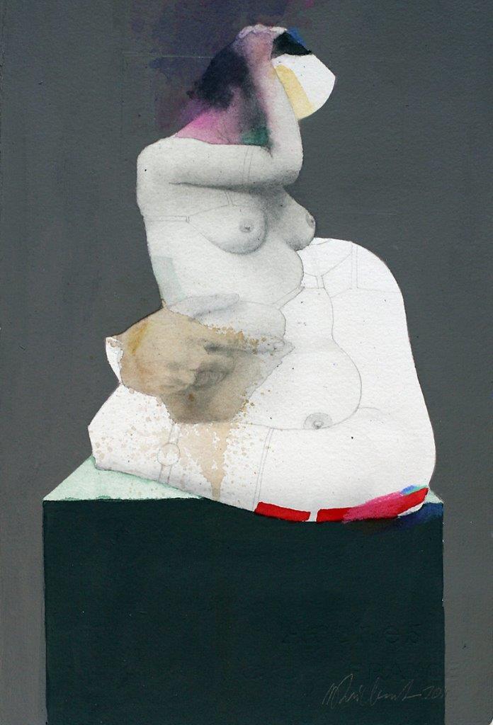 Willy Reichert, Stilrichtung Figürliches